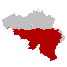 Kaart Franse Gemeenschap